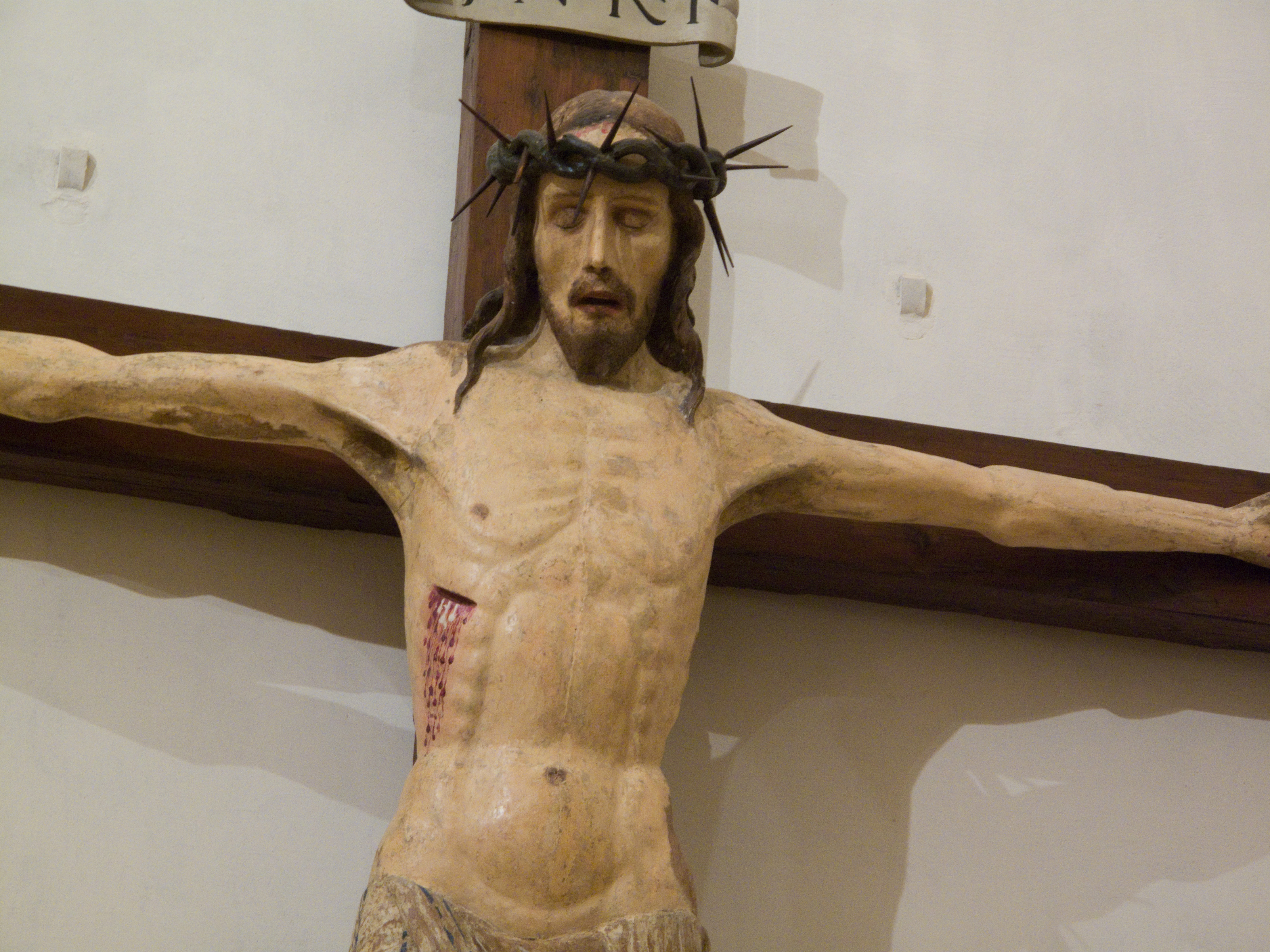 Vicenza - Chiesa di Santa Corona - Crocifisso del Trecento